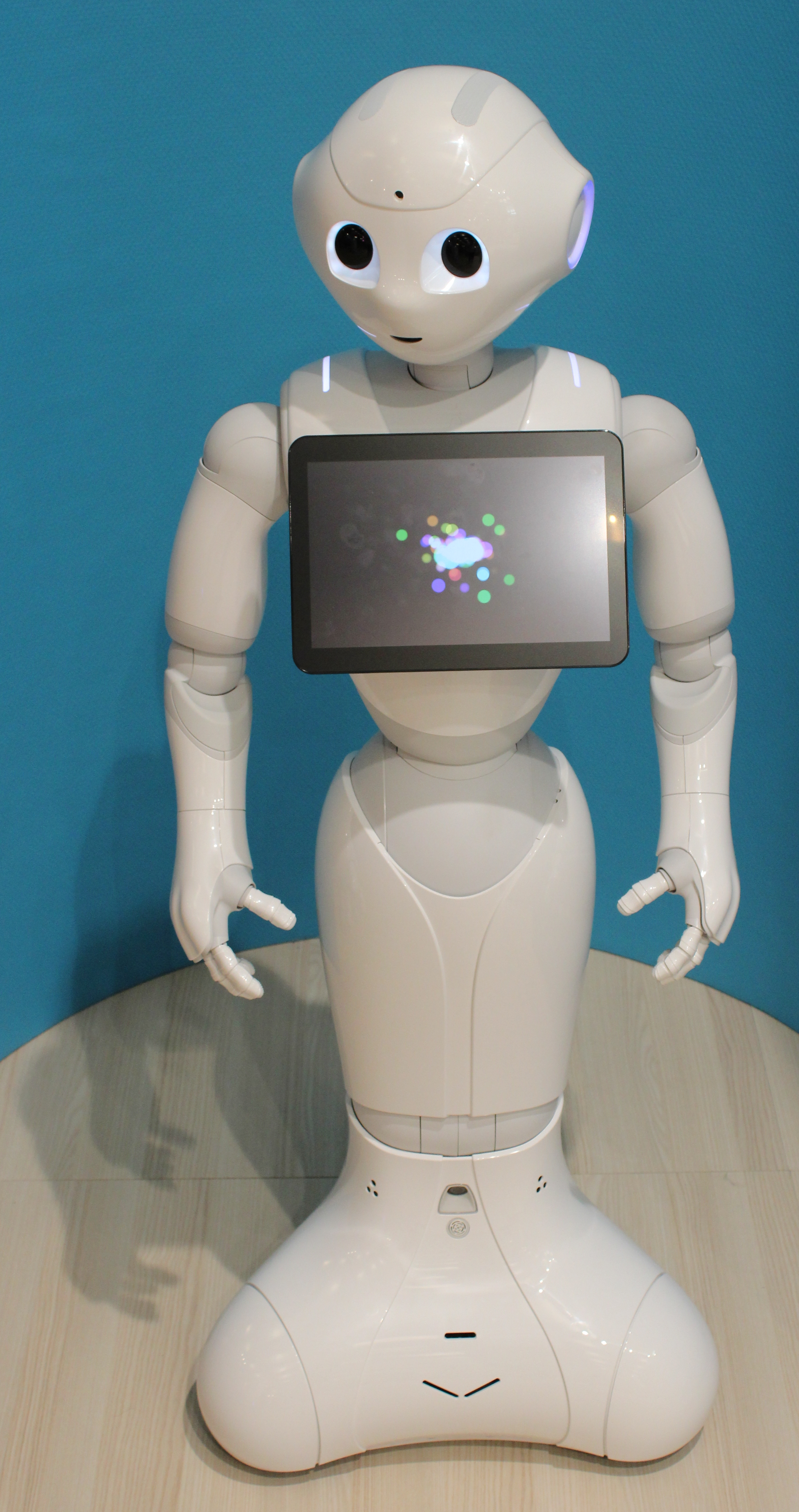 Le robot Pepper de l'entreprise Aldebaran au salon Innorobo à Lyon en 2015.